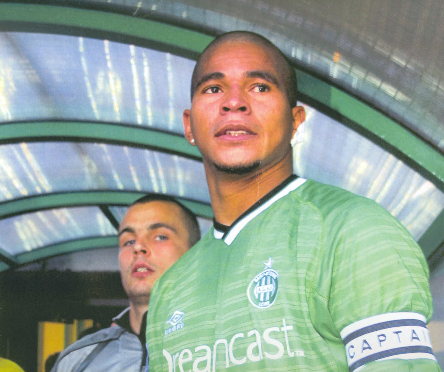 Photo du joueur de football José Aloísio sortant du tunnel menant au terrain du Stade Geoffroy Guichard lors de la saison 2000-2001. Derrière, on peut apercevoir Jérémie Janot. Cette photo à été prise par Mickaël Roure alias Altrensa pour Wikipédia. Elle ne saurait être utilisée sans la mention de son auteur. D'avance merci.